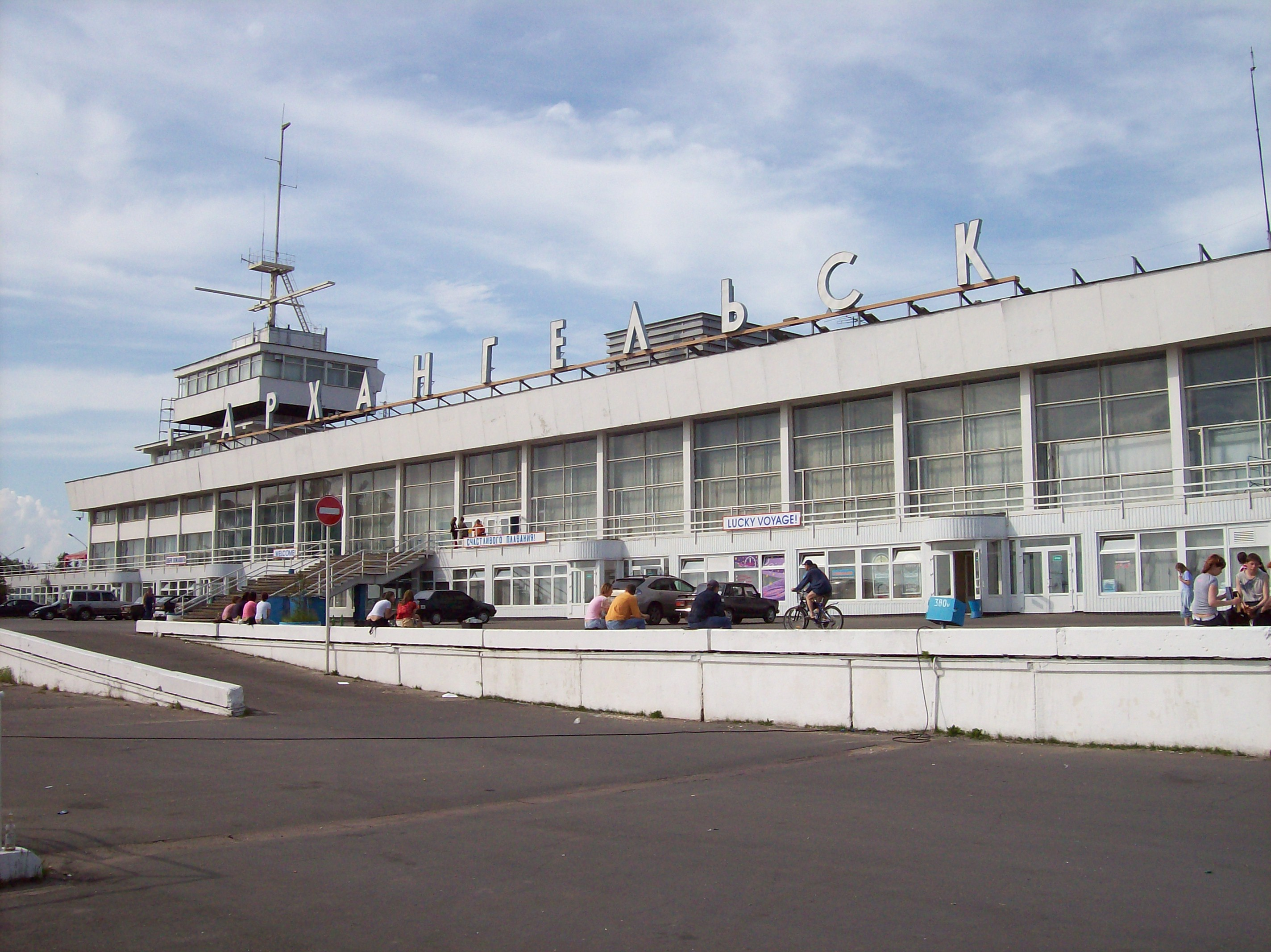 Морской речной вокзал Архангельска, июнь 2007